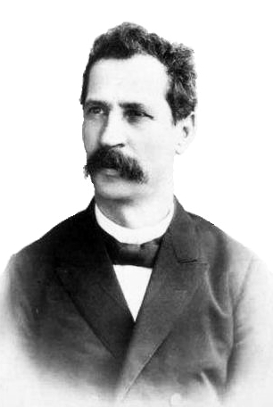 Constantin Erbiceanu (n. 5 august 1838, Erbiceni, Iași - d. 21 martie 1913, București)